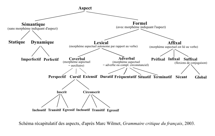 Schéma_récapitulatif_des_aspects_d'après_Marc_Wilmet, Grammaire critique du français, Duculot, Bruxelles, 2003 pour la 3e édition, p.345 (le tableau est de Marc Wilmet), ISBN 2 8011 1337 9